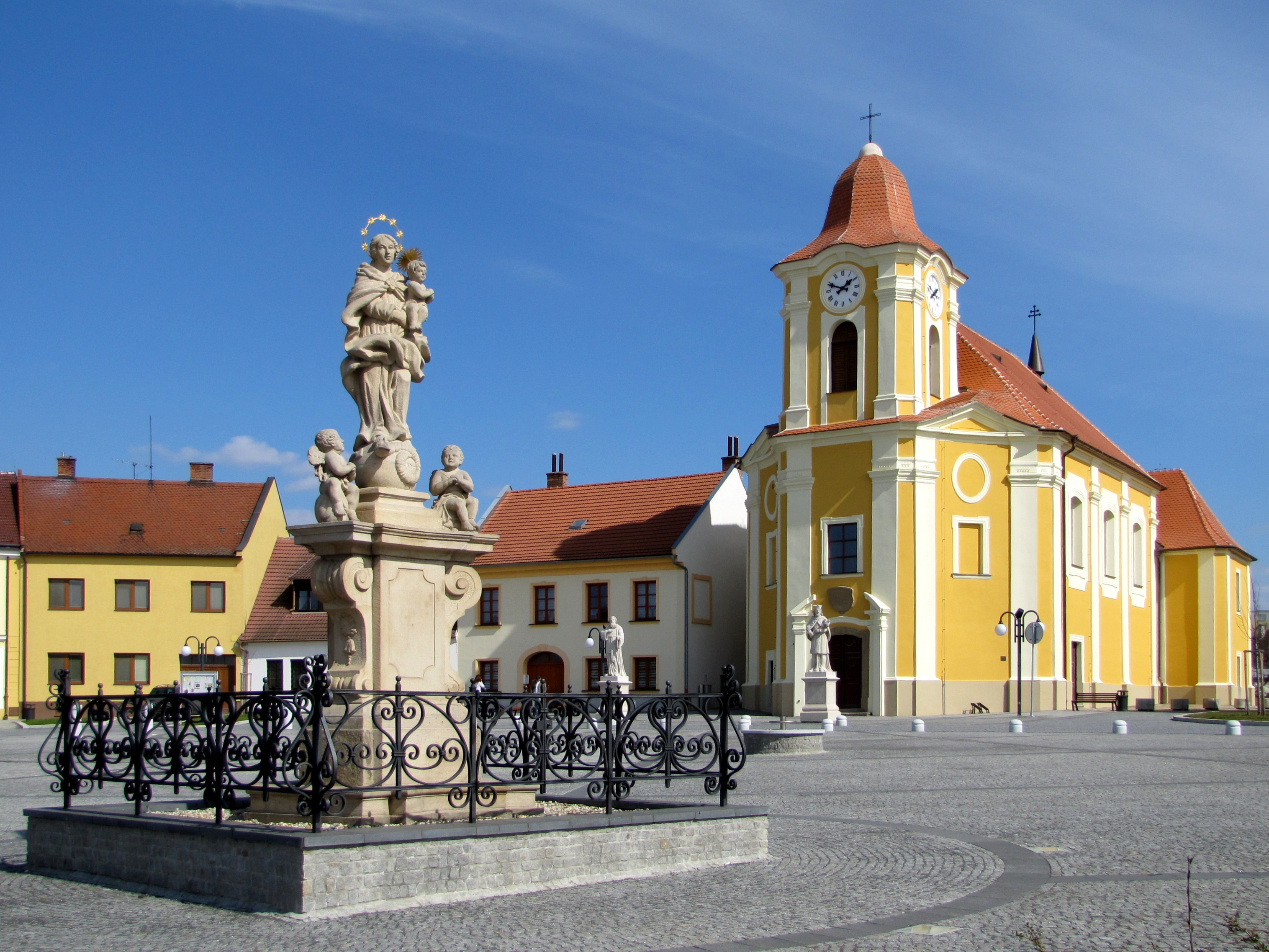 Bartolomějské náměstí ve Veselí nad Moravou